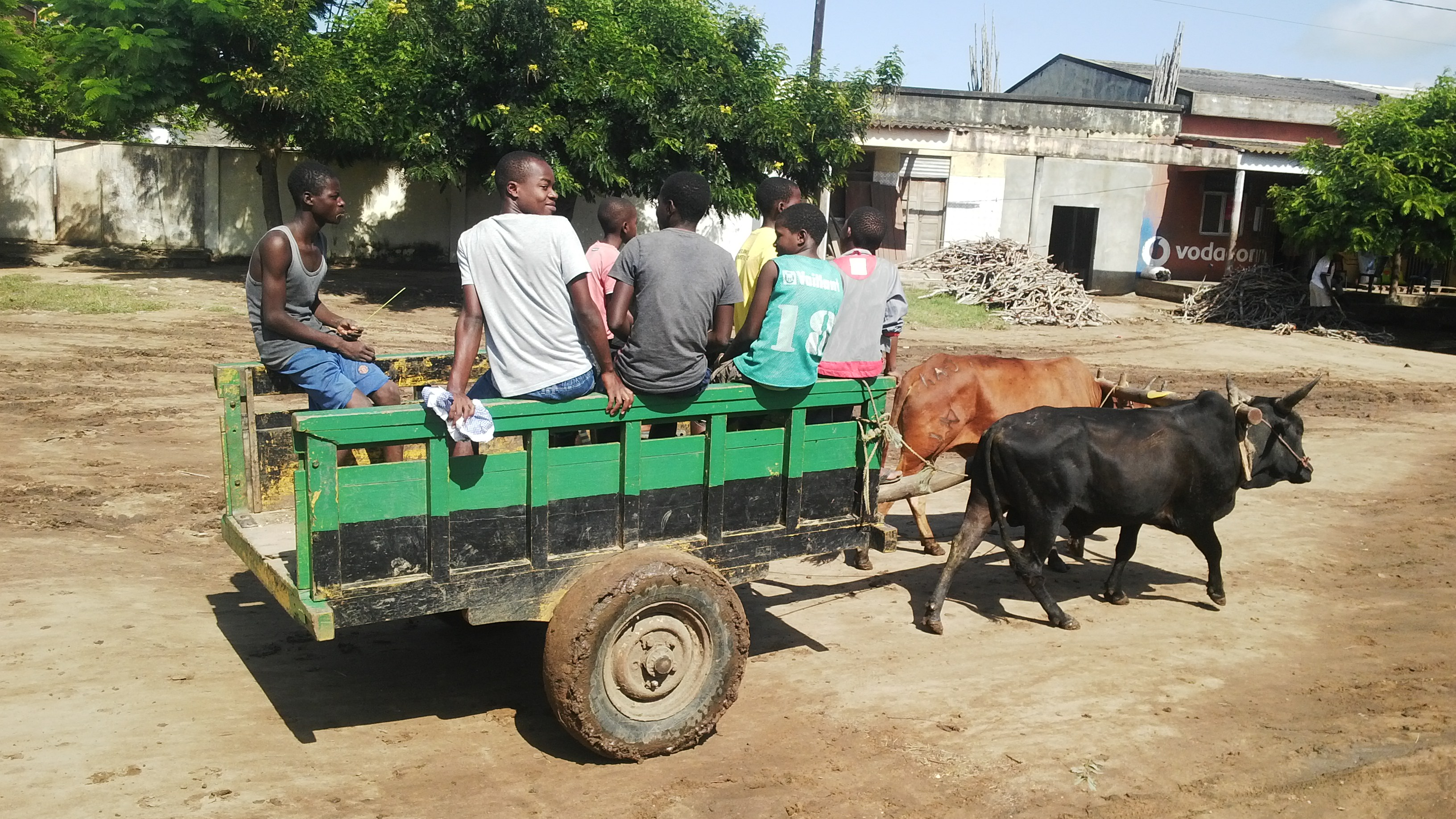 esta imagem é mais um ilustraçõa do meio de transporte usado na provincia de Sofala, destrito de Machanga, em todas as actividade diarias. até para ir ao mercado. This is an image with the theme "Play" from: Mozambique